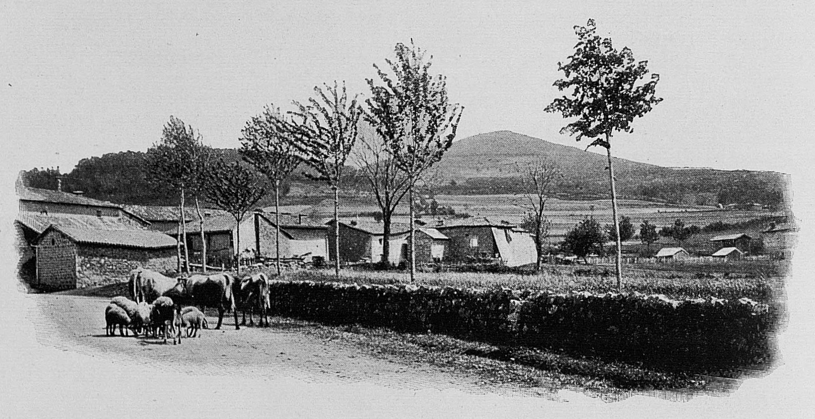 Dictionnaire illustré des communes du département du Rhône. Tome 1 / par MM. E. de Rolland et D. Clouzet.